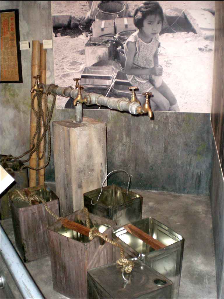 香港歷史之制水